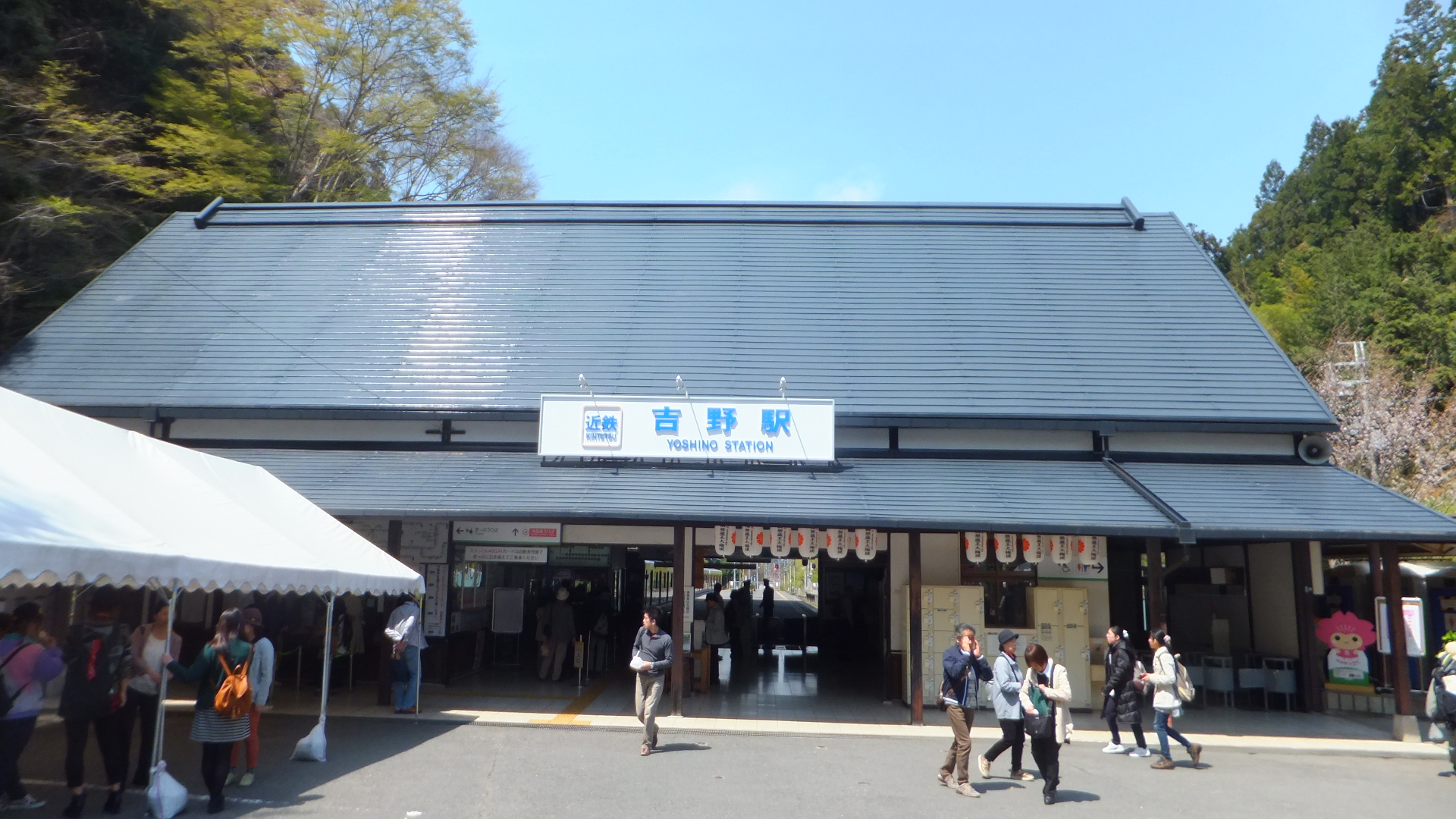 吉野駅（2014年4月19日）